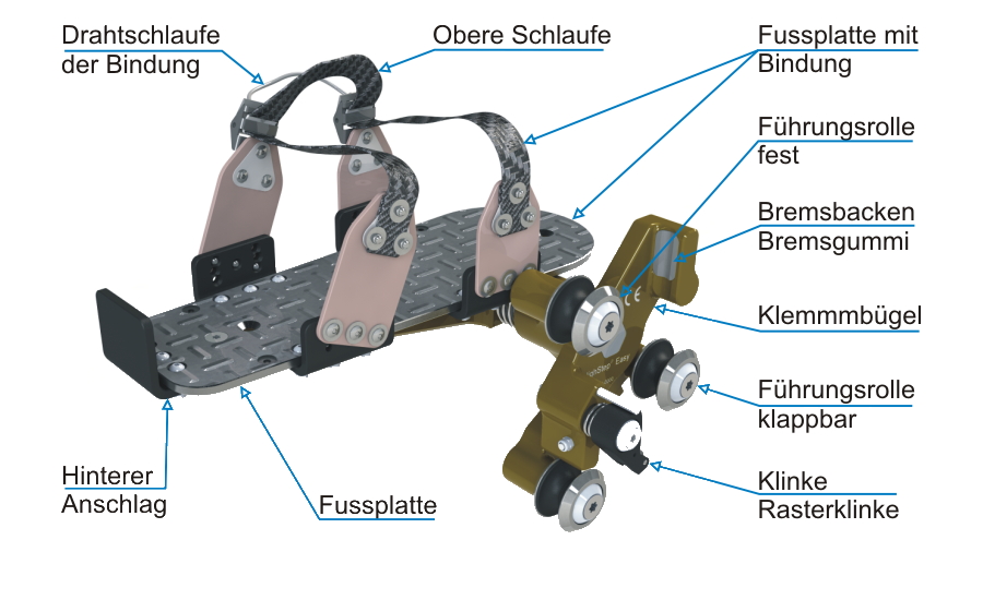 Dieses Bild beschreibt die Komponenten von dem HighStep Easy Pedal.